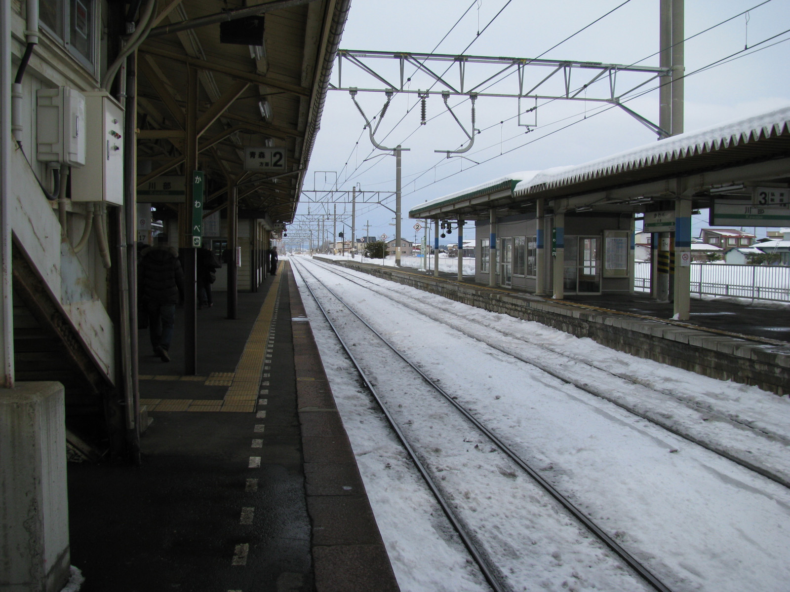 JR川部駅